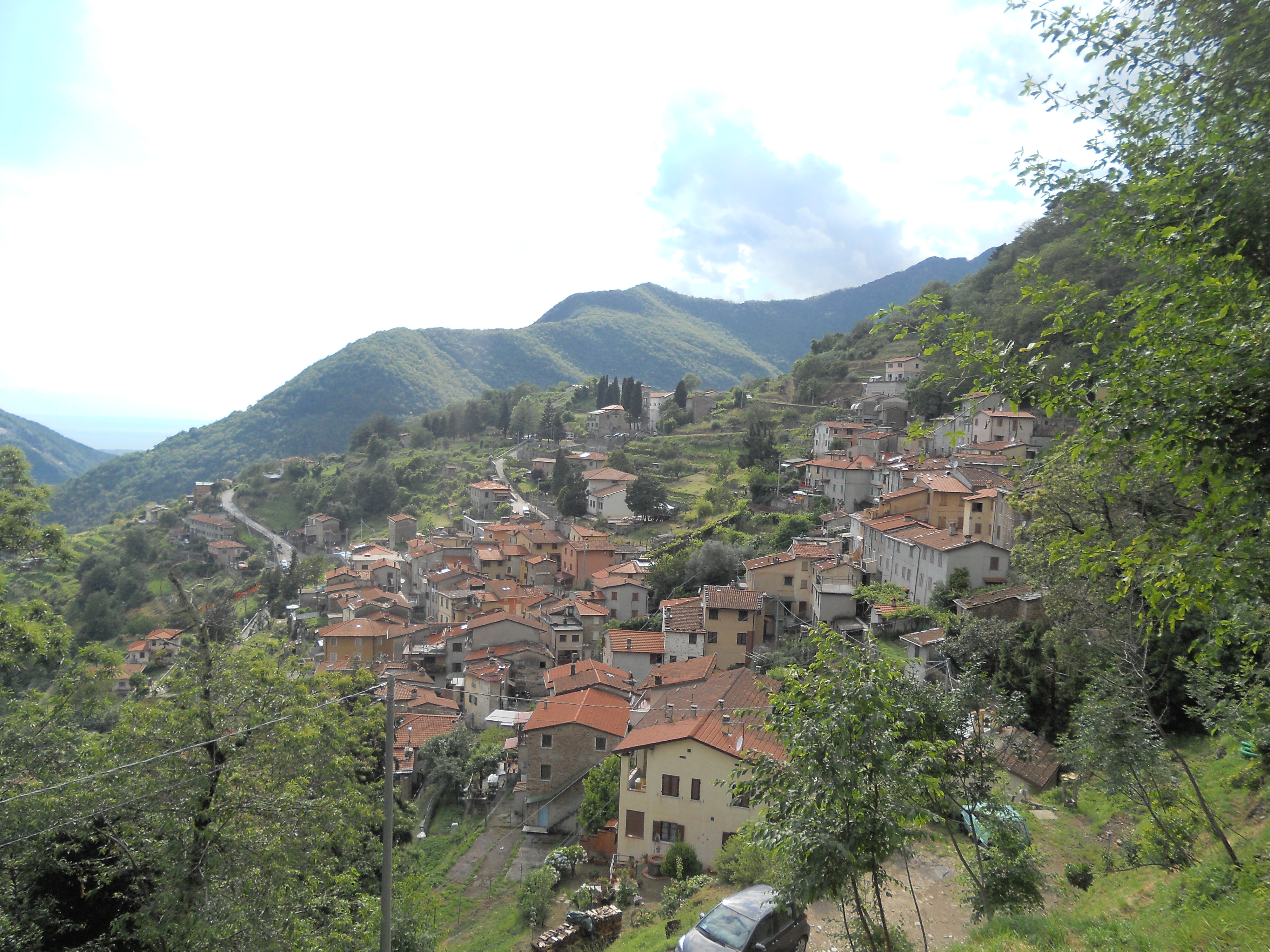 Veduta da Sanatoio del paese di Retignano, Stazzema